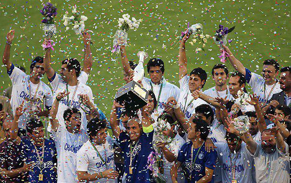 استقلال - ورزشگاه آزادی - جام حذفی - قهرمانی